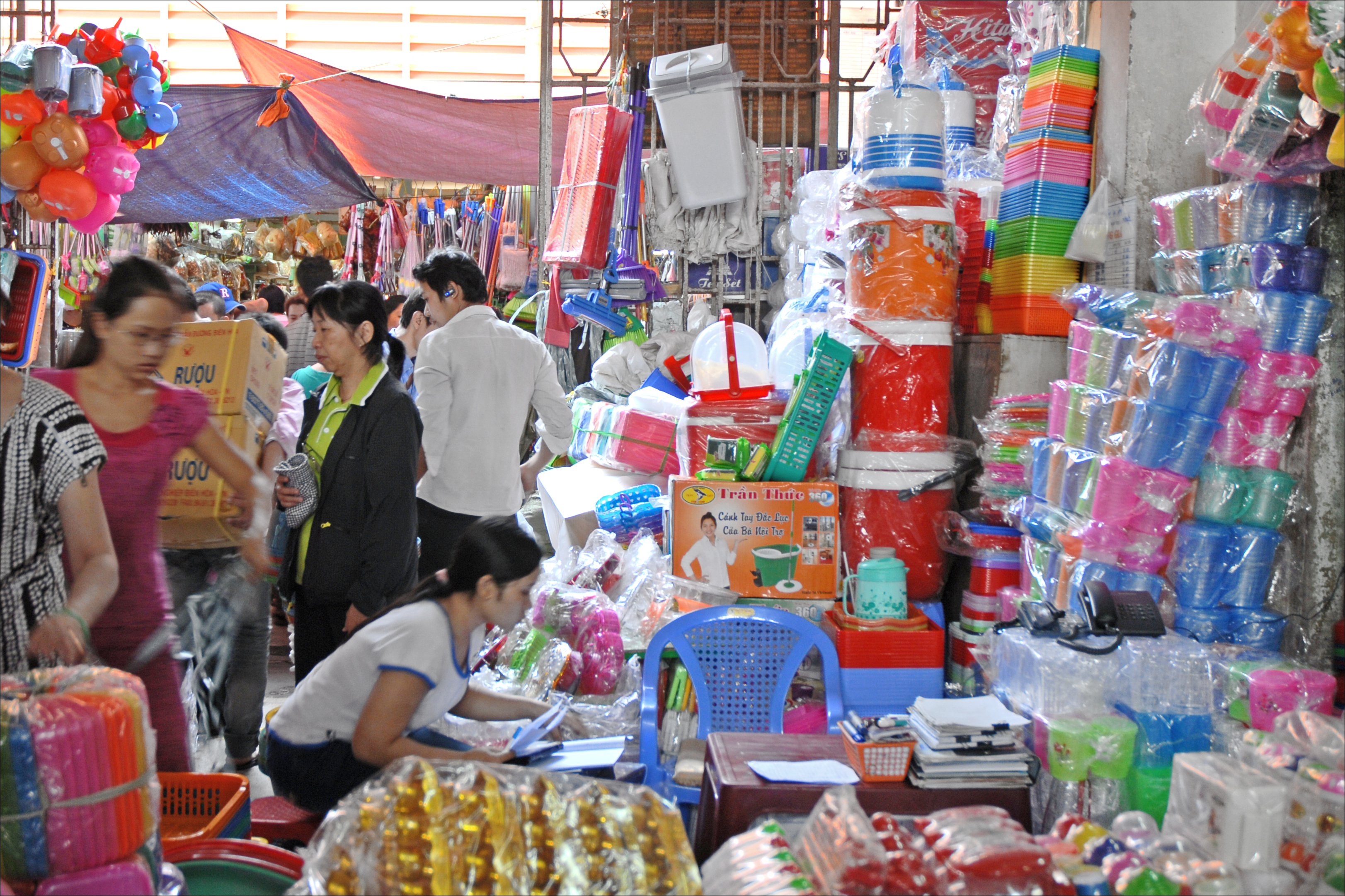 Le marché de Binh Thay a été fondé en 1930 par un négociant chinois dans le quartier commerçant de Cho Lon. Les marchands sont regroupés par secteur. Il y règne une activité intense et les touristes doivent rester discrets.